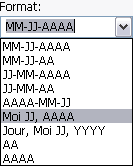 Un exemple de boîte-combinée dans un logiciel